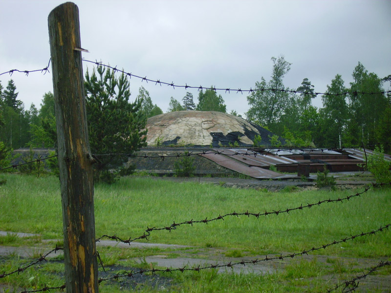 Plokštinės požeminė balistinių raketų su termobranduoliniais užtaisais bazės sachtos kupolas.